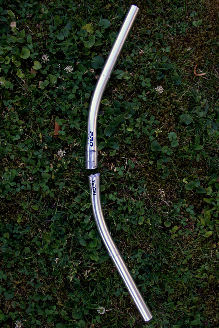 Eine gebrochene Lenkstange – Am Lenkervorbau gebrochener Aluminiumlenkbügel; Detailaufnahme: Bruchdetail.JPG